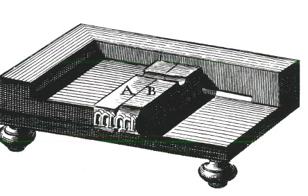 Giustificatore per il controllo dei caratteri tipografici